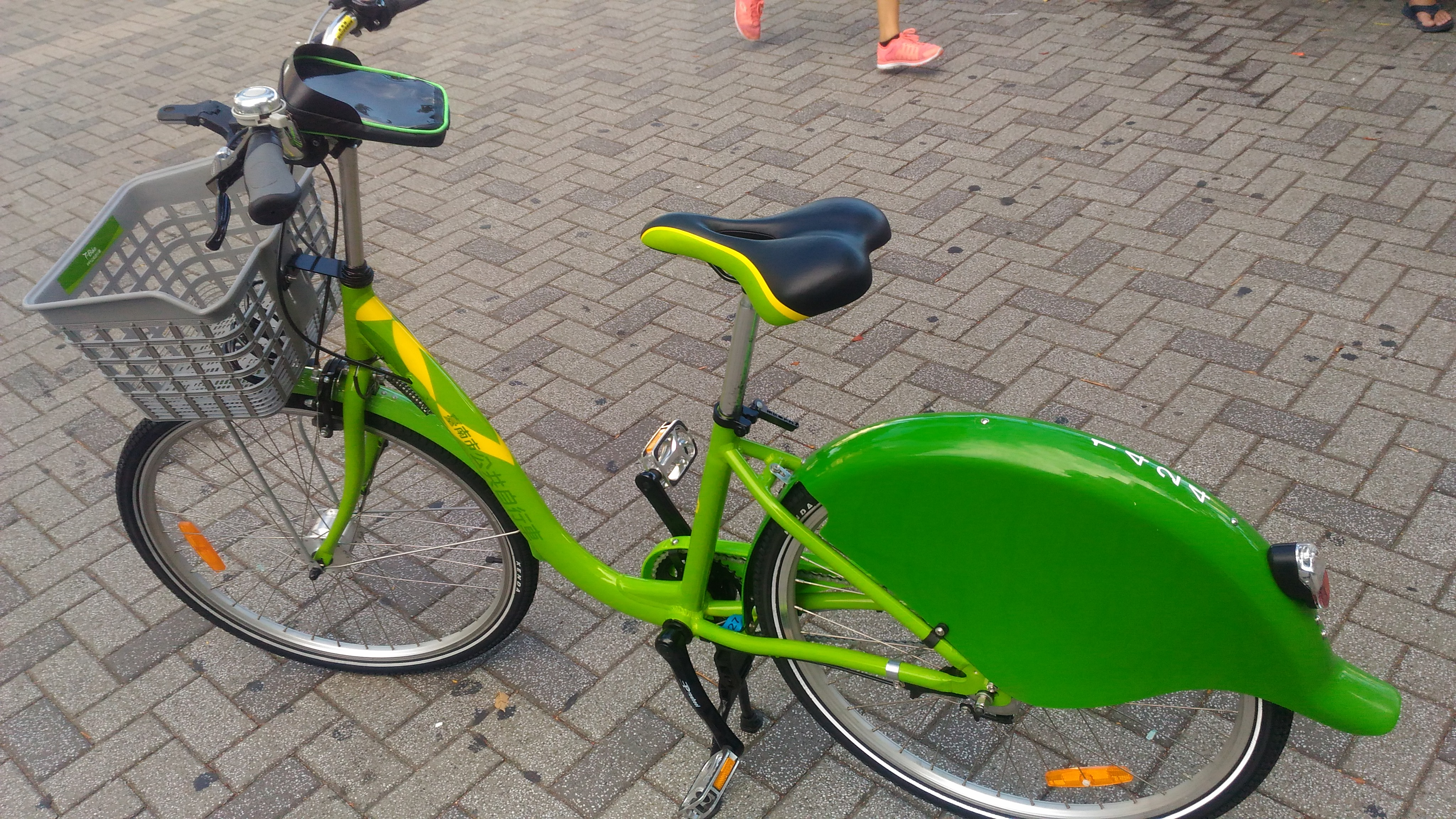 台南市公共自行車的車體